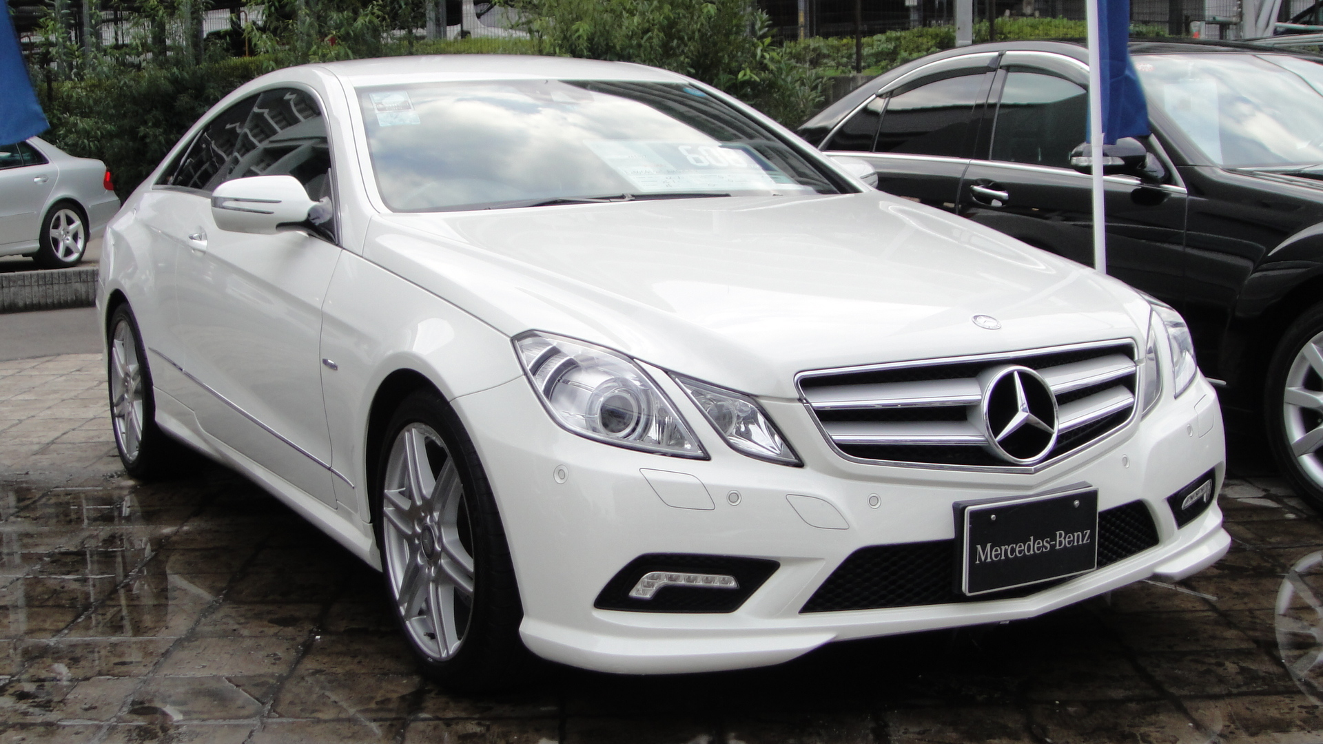 Mercedes-Benz Eクラス クーペ